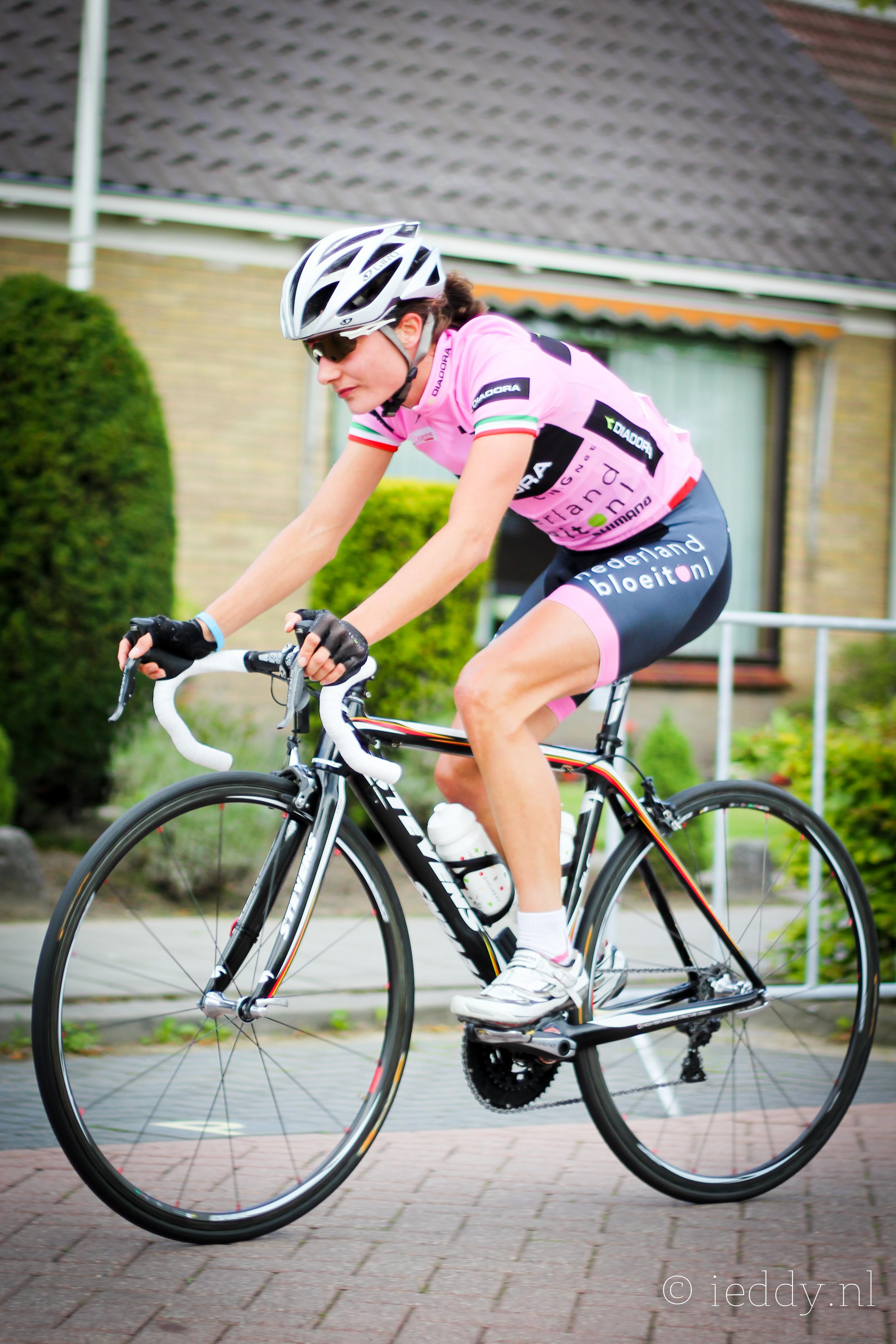 Nederland Bloeit Draai van de Kaai 2011